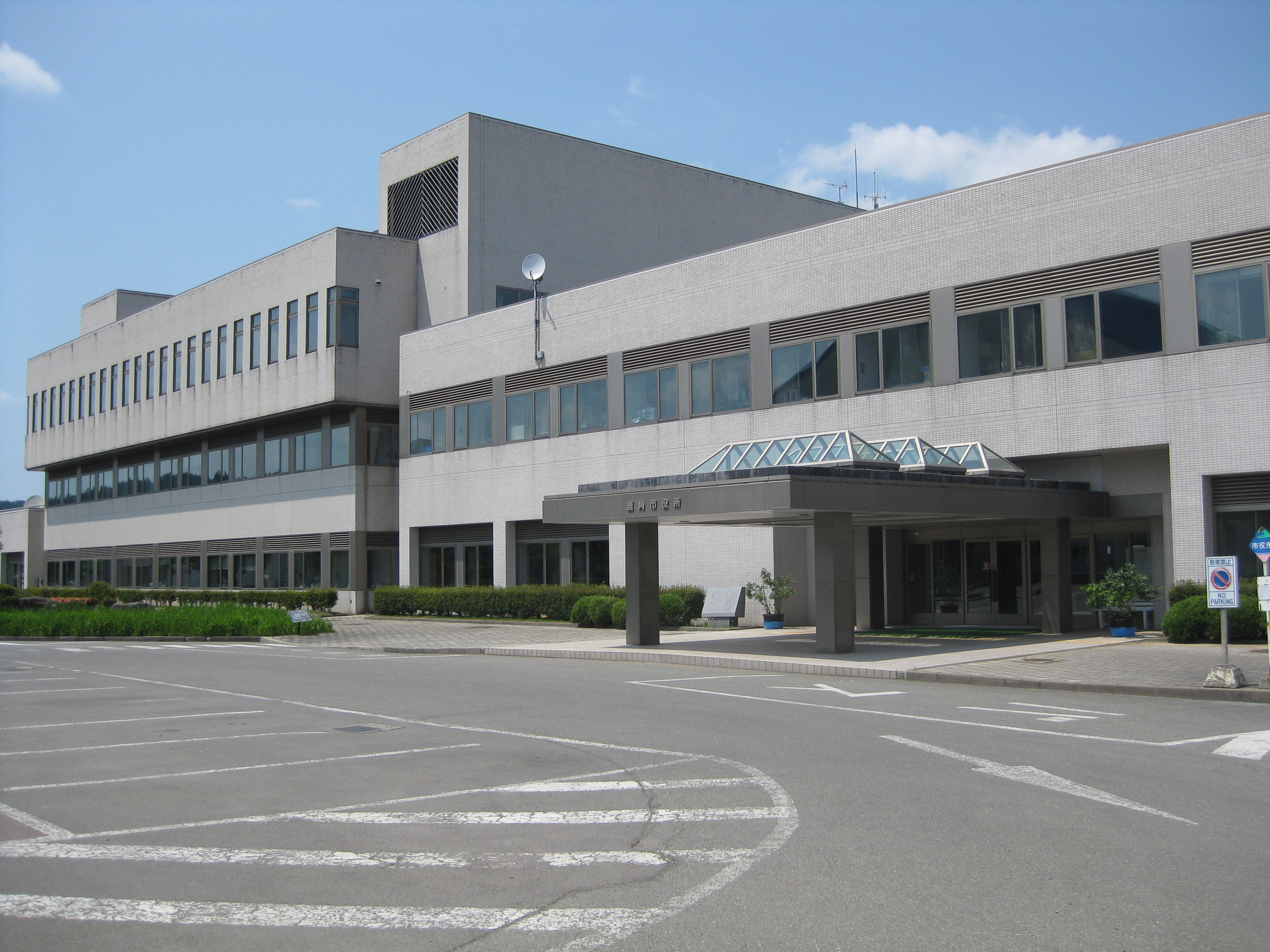 鹿角市役所